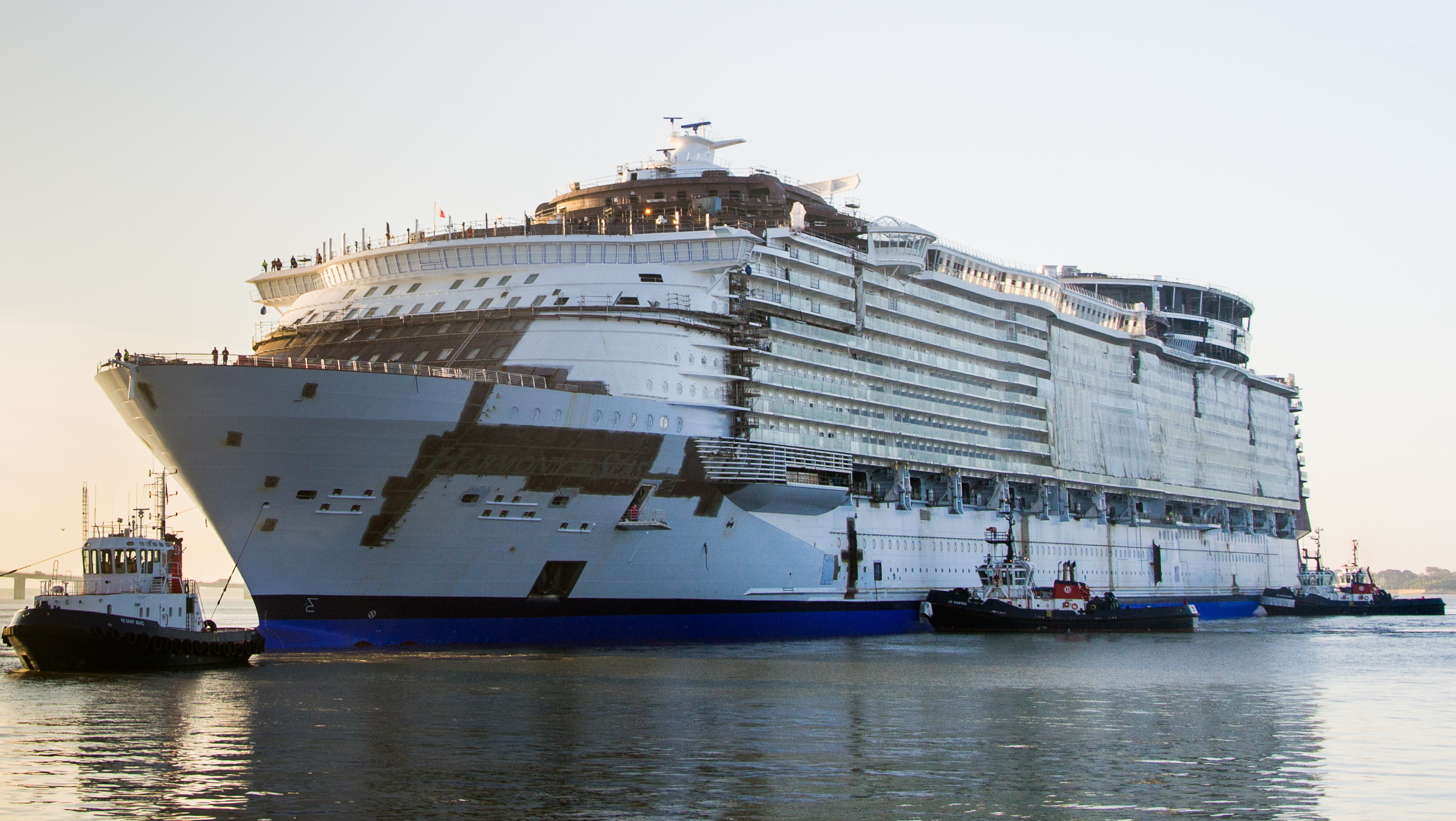 Le Harmony of the Seas lors de son changement de bassin pour son armement au Chantier naval de Saint-Nazaire en Juin 2015.